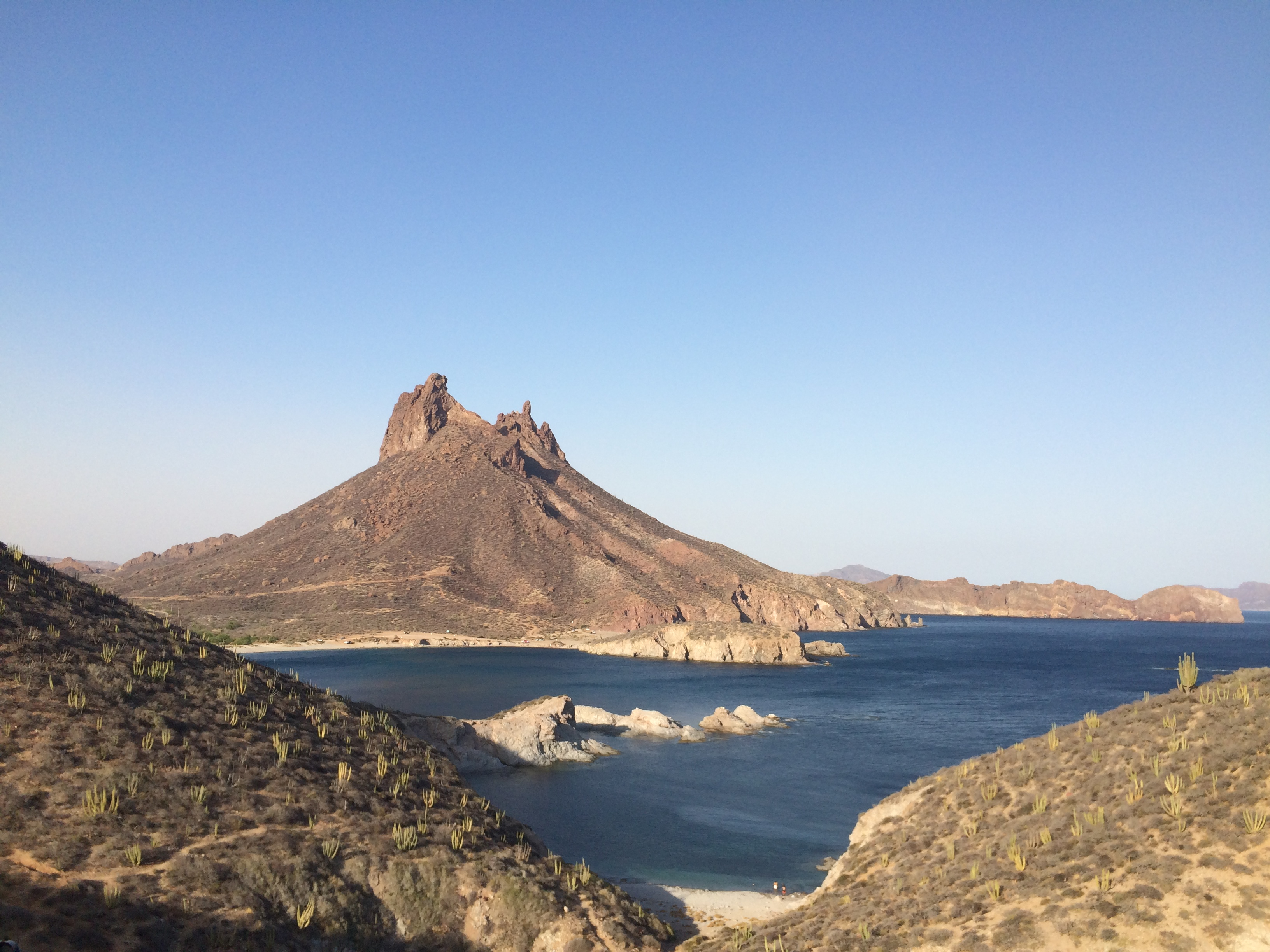 Vista del Cerro Tetakawi desde el mirador de San Carlos, Guaymas, Sonora, México.